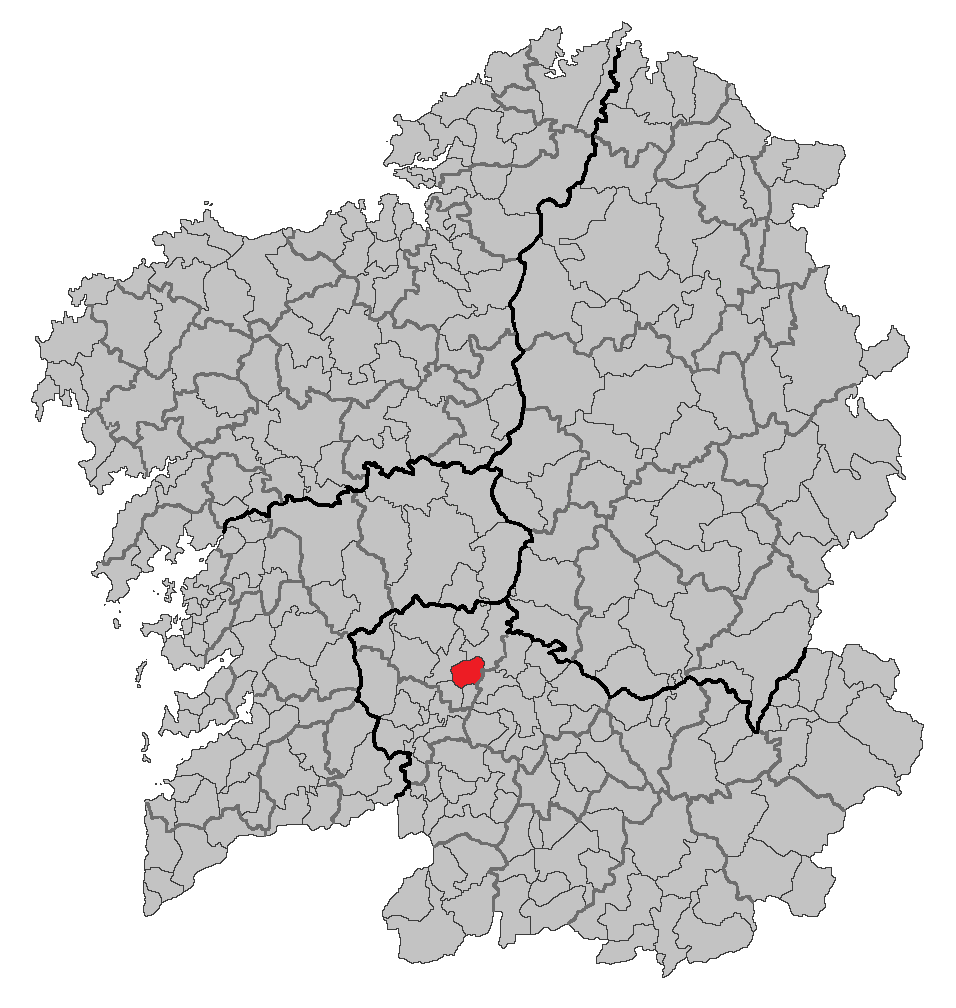 Mapa coa localización do concello de Maside.